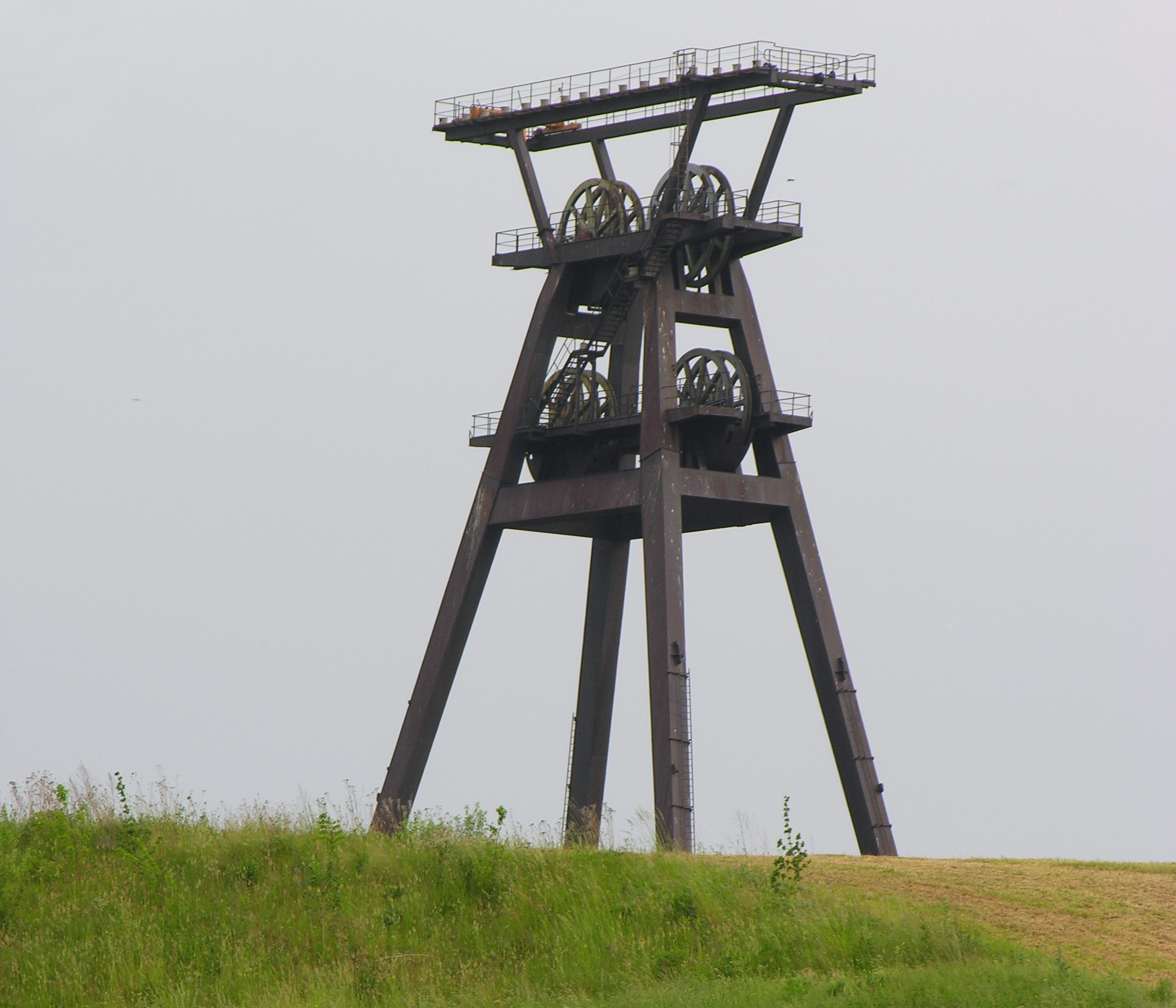 Löbichau Schacht Drosen Bergbau Förderturm Industriedenkmal neuer Ackerbau 2007 Foto Wolfgang Pehlemann Wiesbaden DSCN2387